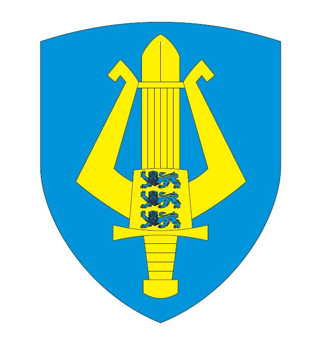 Wappen des estnischen Militärorchesters